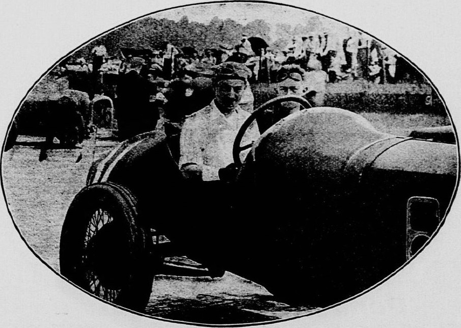 André Boillot, vainqueur de la Targa Floriot 1919 sur Peugeot - Le Monde Illustré du 29 novembre 1919, p.907